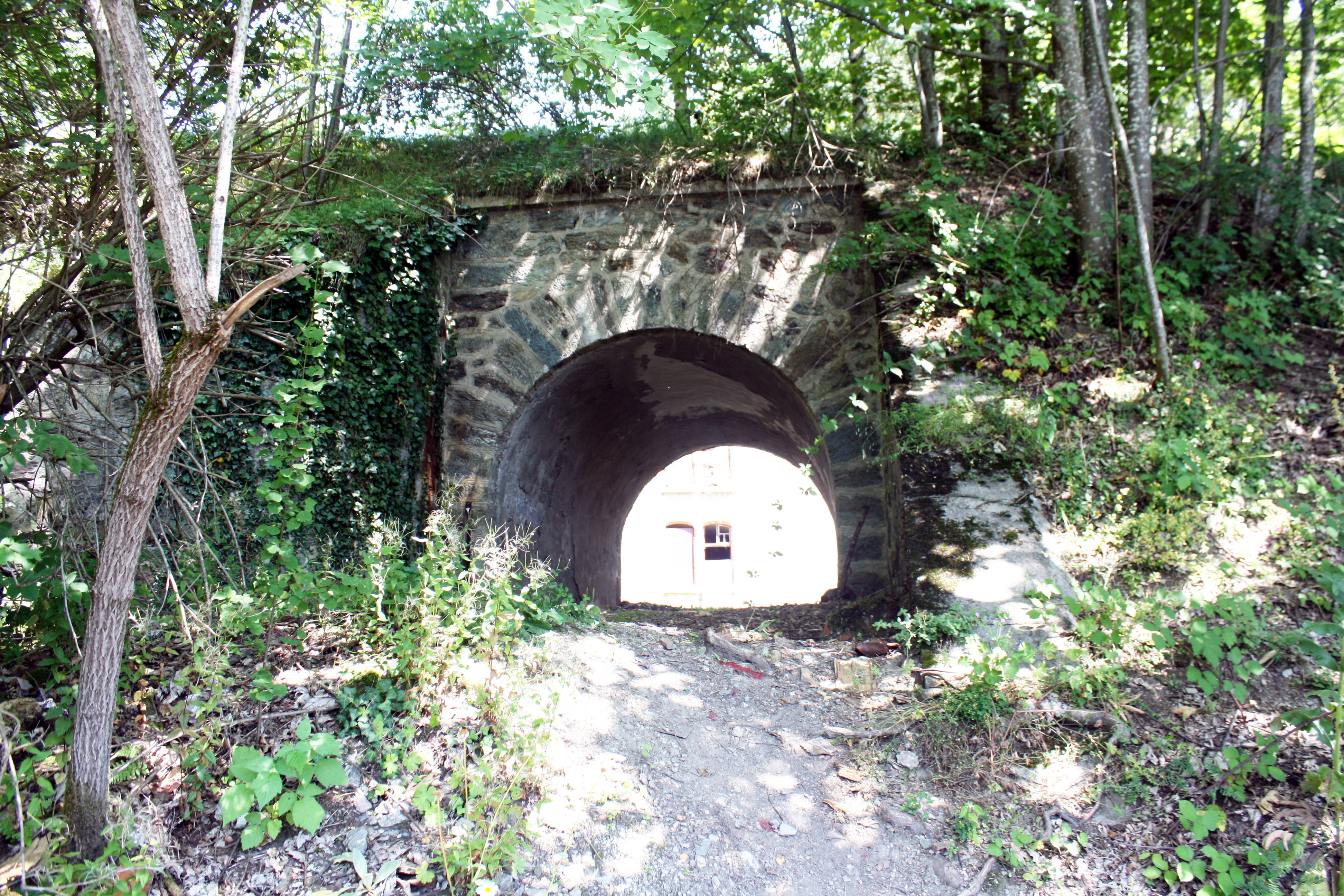 Un passage couvert du fort du Mont...